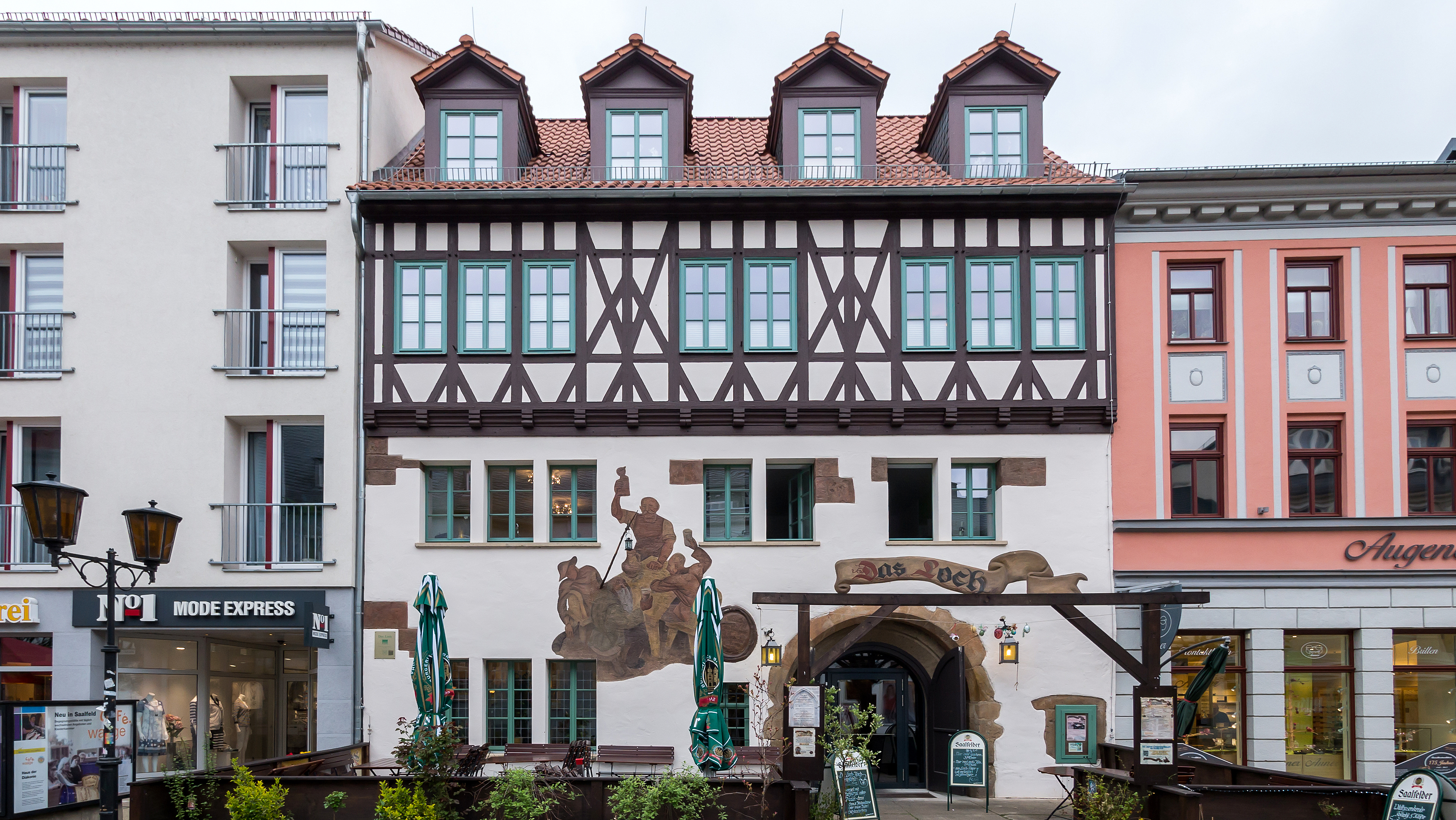 Saalfeld Blankenburger Straße 8 Gaststätte "Das Loch" I